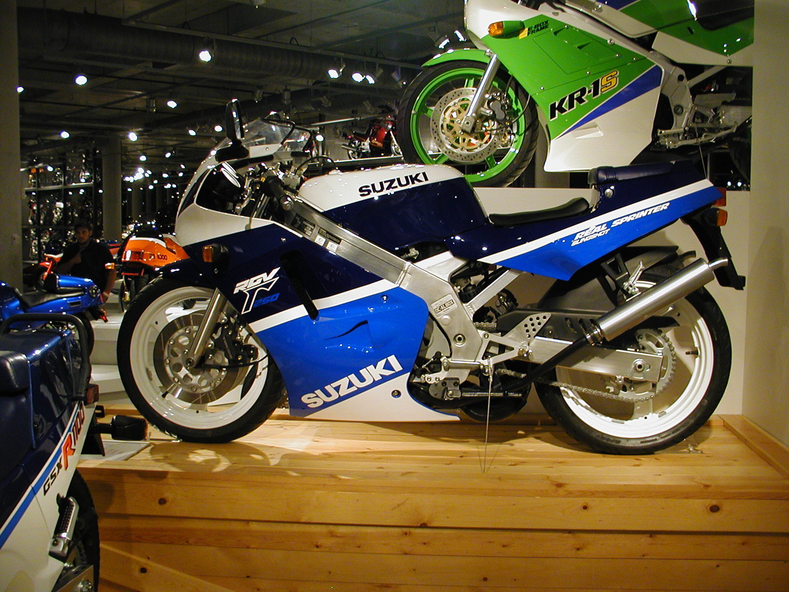 Barber Motorcycle Museum - Oct 22 2006 (92) Suzuki RGV250Γ